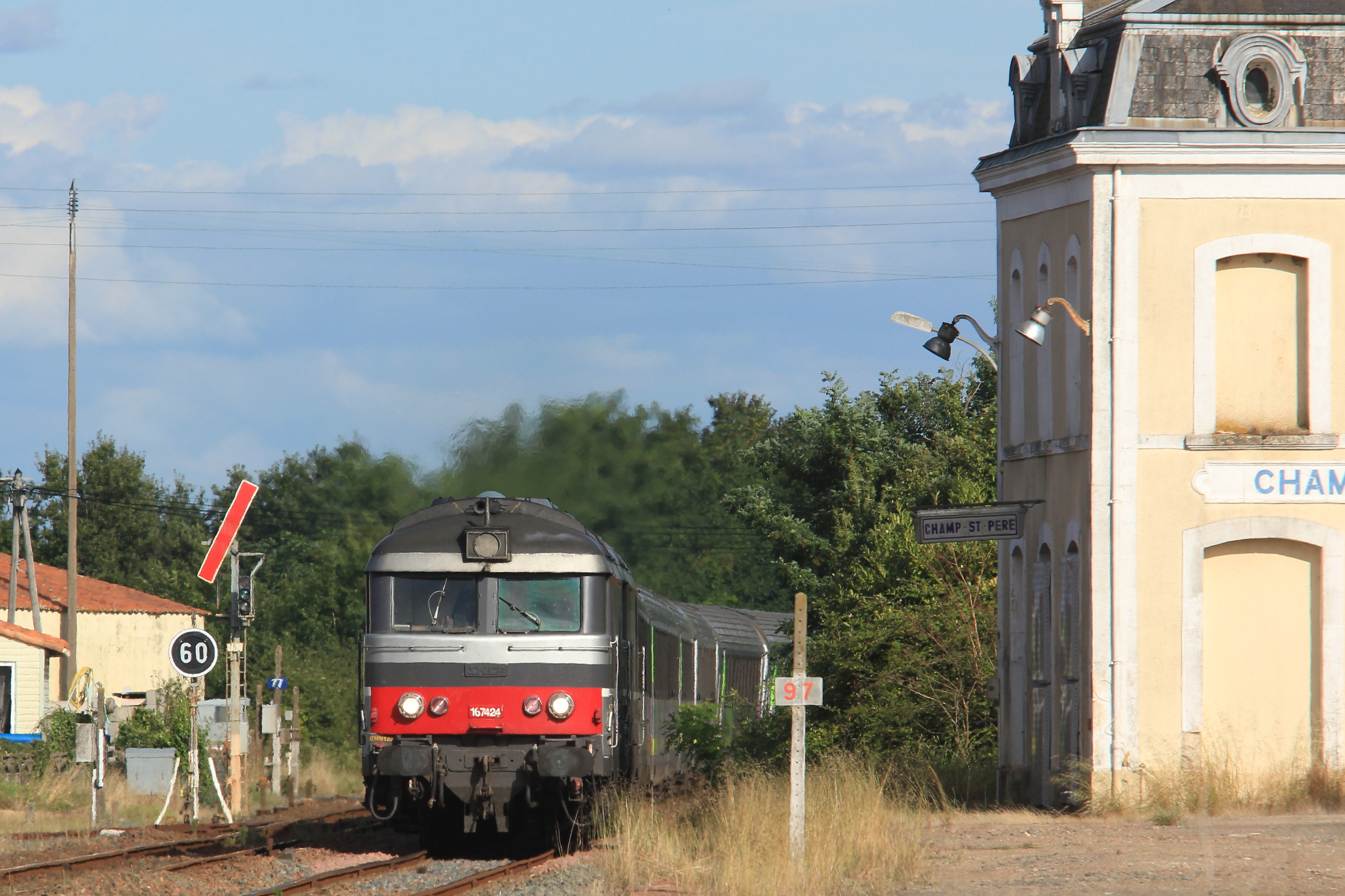 La BB67424 et une seconde, en livrée multiservice, tirent 8 voitures Corail Intercité au passage en gare de Champ-Saint-Père, au train Intercité 3854 Bordeaux - Quimper.